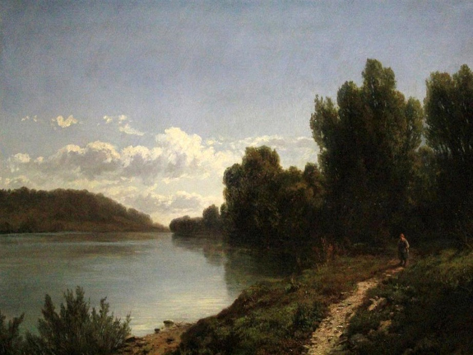 "Paesaggio lacustre", olio su tela, 96 x 72 cm., firmato